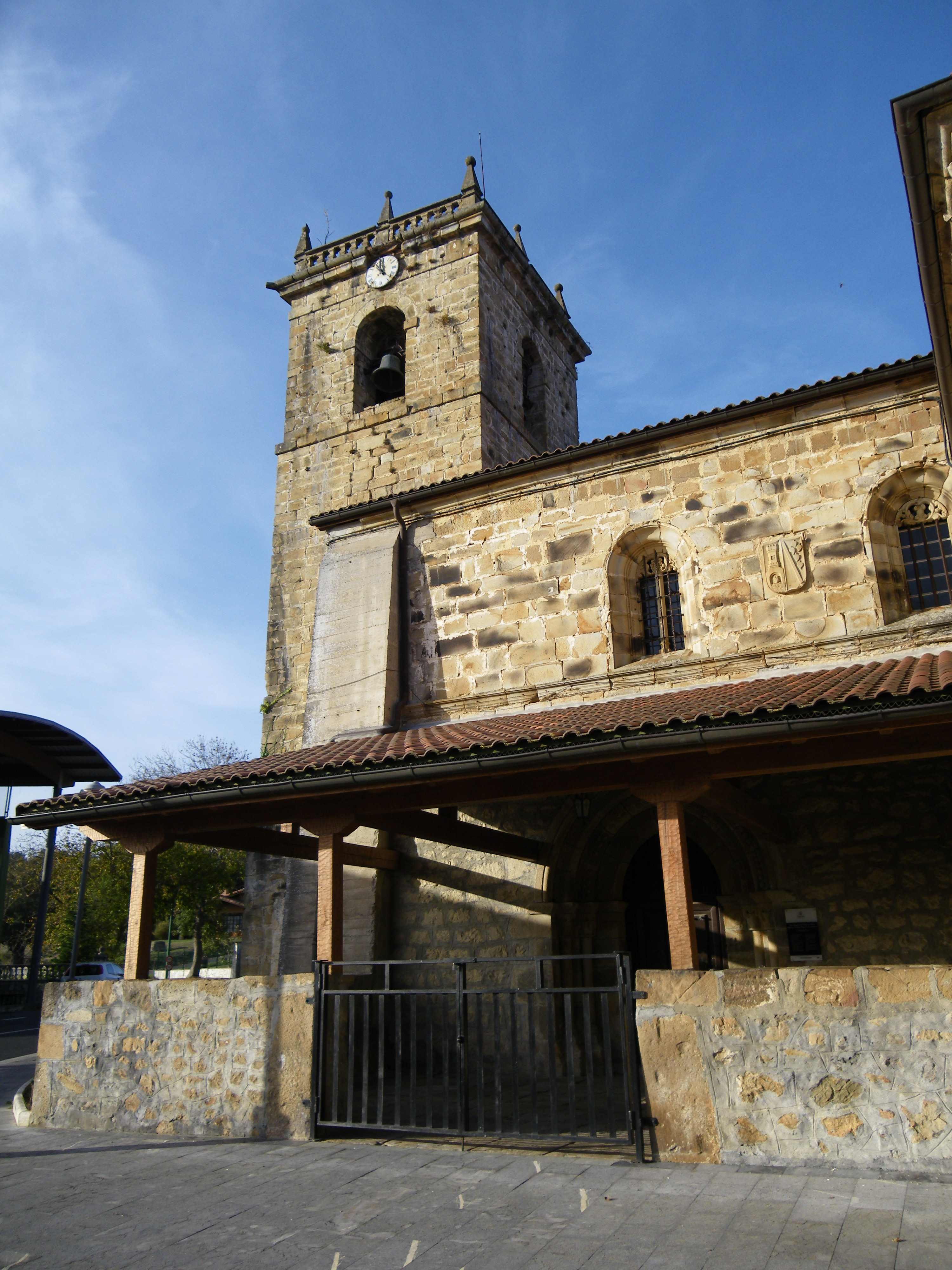 Linaresko Done Mikel elizako kanpoaldea, Artzentales (Bizkaia) udalerriko hiriburuan kokatuta dagoena.